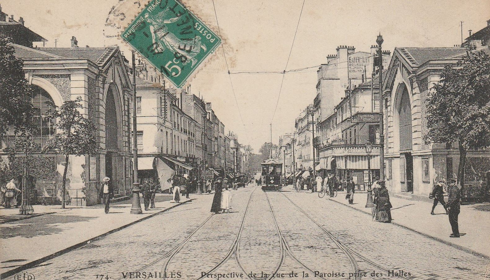 Carte postale du début du XXe siècle avec en illustration photo la rue de la Paroisse vue depuis la place des Halles à Versailles.